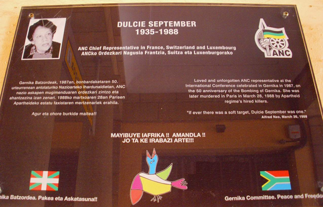 Memorial de Dulcie September en la Oficina de Turismo de Gernika (Vizcaya, País Vasco, España)